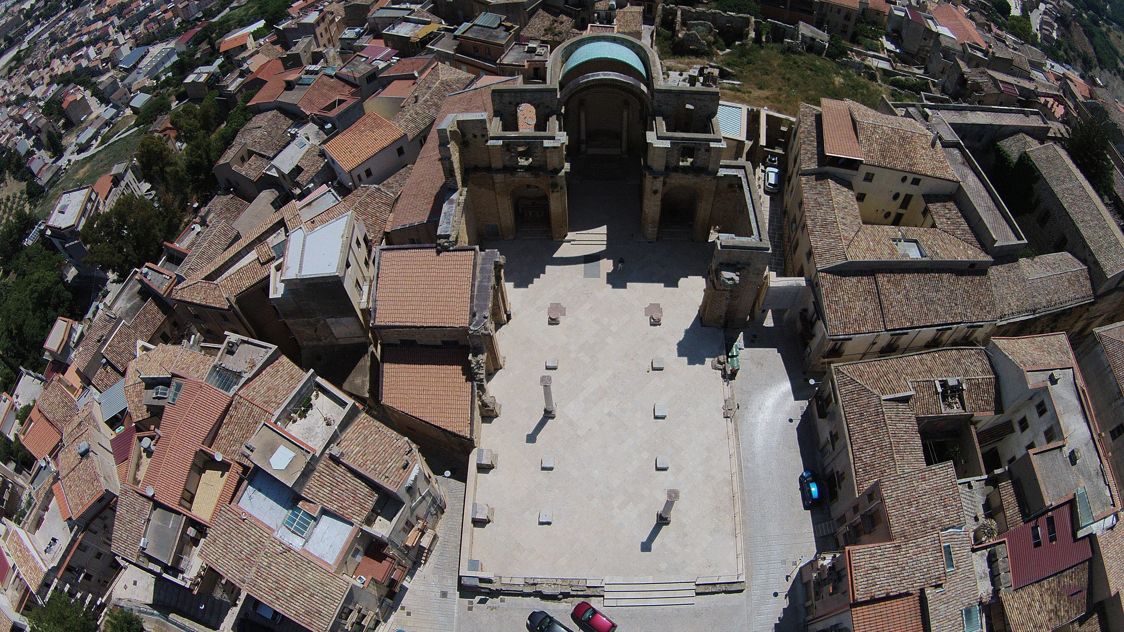 Salemi. Vista da drone